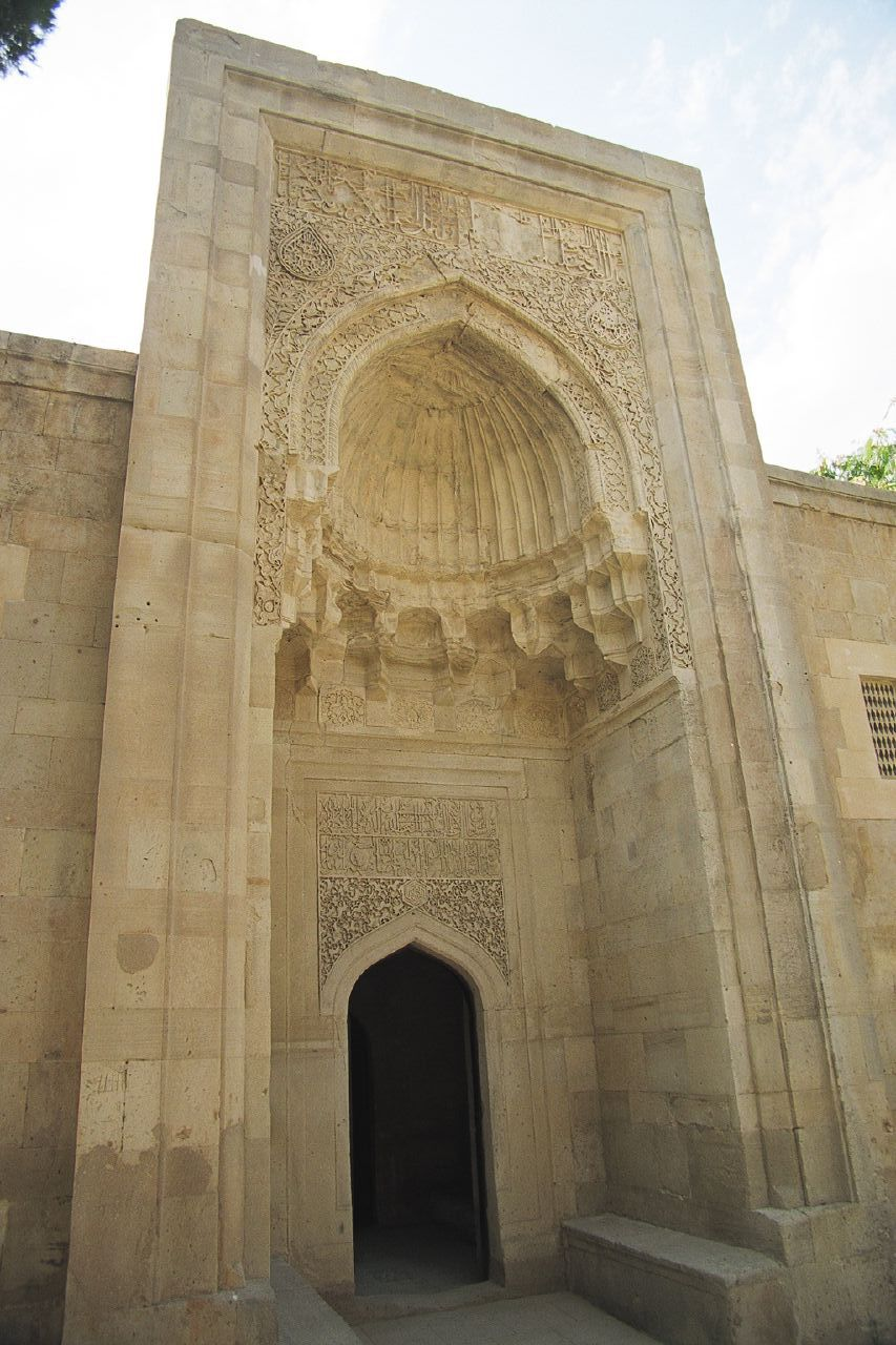 Baku, Azerbaiginan